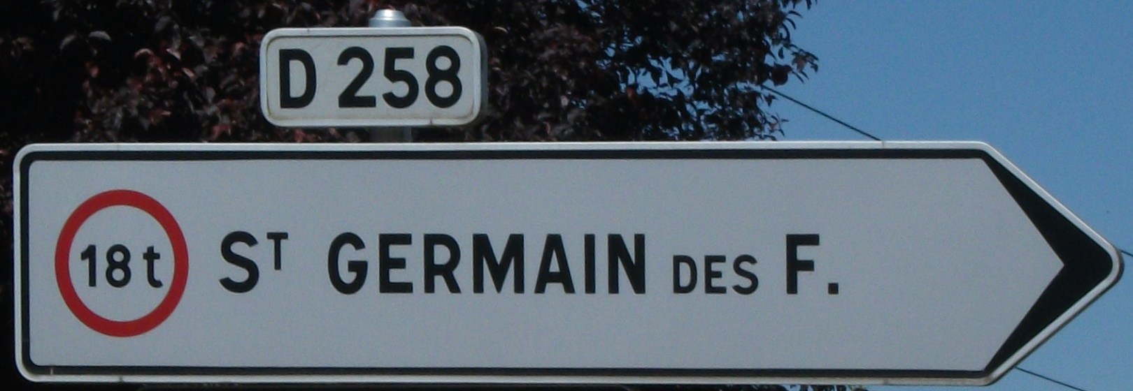 Panneau de la RD 258 dans l’Allier, Saint-Germain-des-Fossés est interdit aux plus de 18 tonnes. Panneau Nadia signalisation 1998 retouché avec GIMP suivant la matrice de perspective {0.97653, 0.00833, -9; 0.04491, 1.01488, 6; 1E-5, 2E-5, 1}.